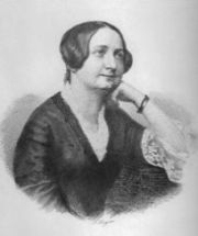 Caterina Bon Brenzoni, gravure